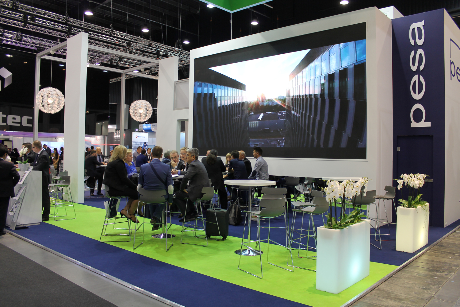 Stoisko Pesy podczas targów Trako 2015. The making of this document was supported by Wikimedia Polska Association, within Wikigrant no. WG 2015-34. English | polski | +/−